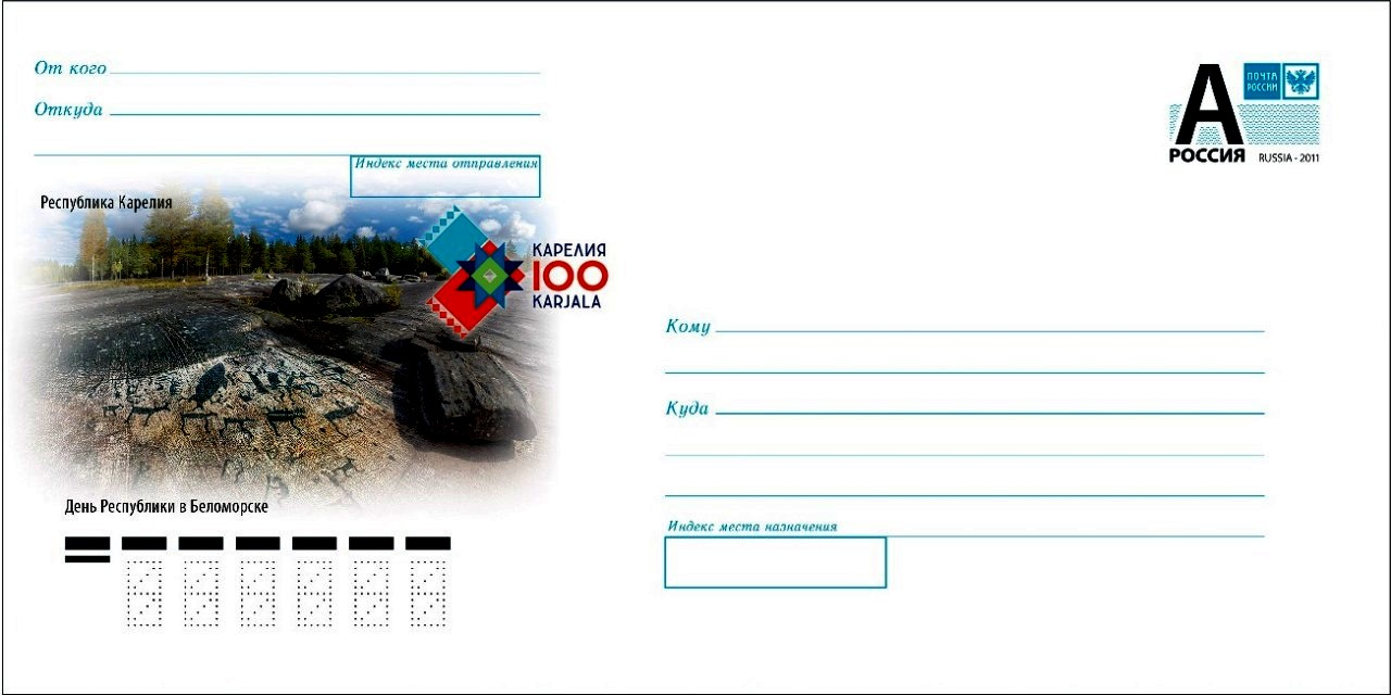 Почтовый конверт "День Республики Карелия в Беломорске". На конверте изображены Беломорские петроглифы (автор изображения фотохудожник И.Георгиевский). На конверте расположен логотип празднования 100-летия Республики Карелия (2020 г.).